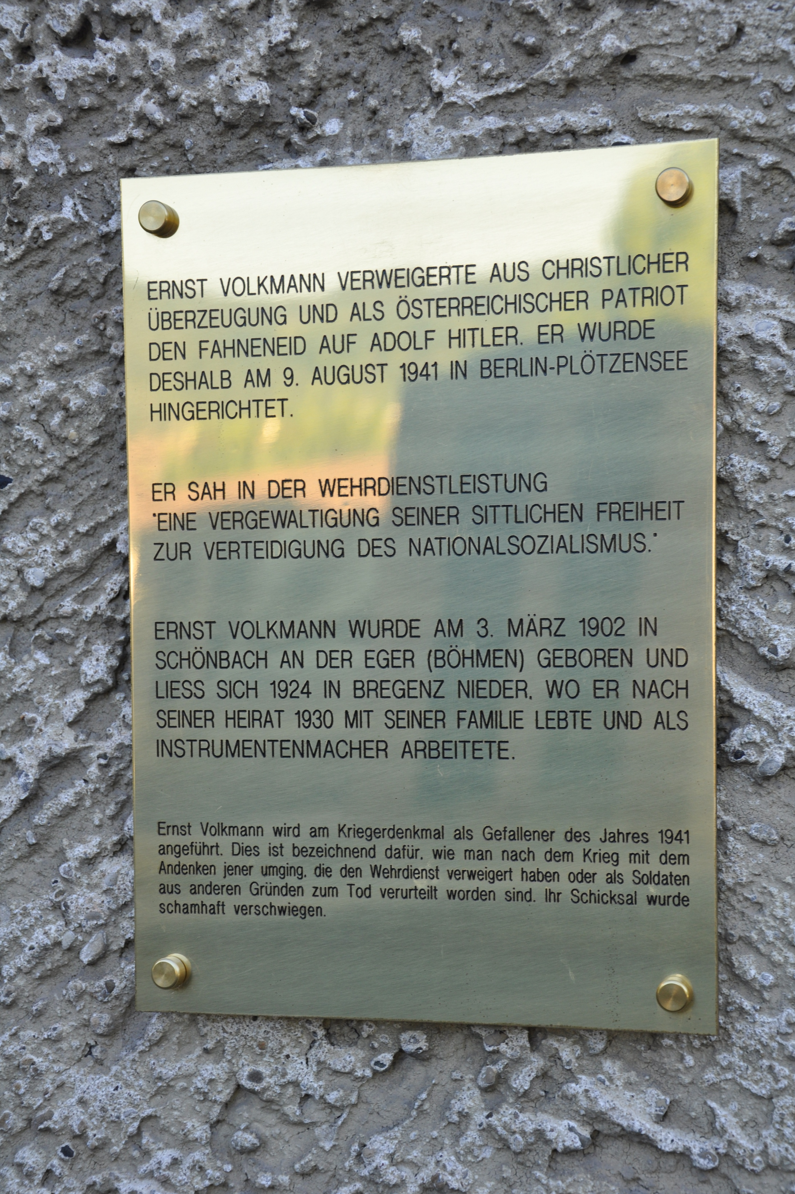 Bregenz, Pfarrkirche St. Gallus, Gedenktafel an den Wehrdienstverweigerer Ernst Volkmann